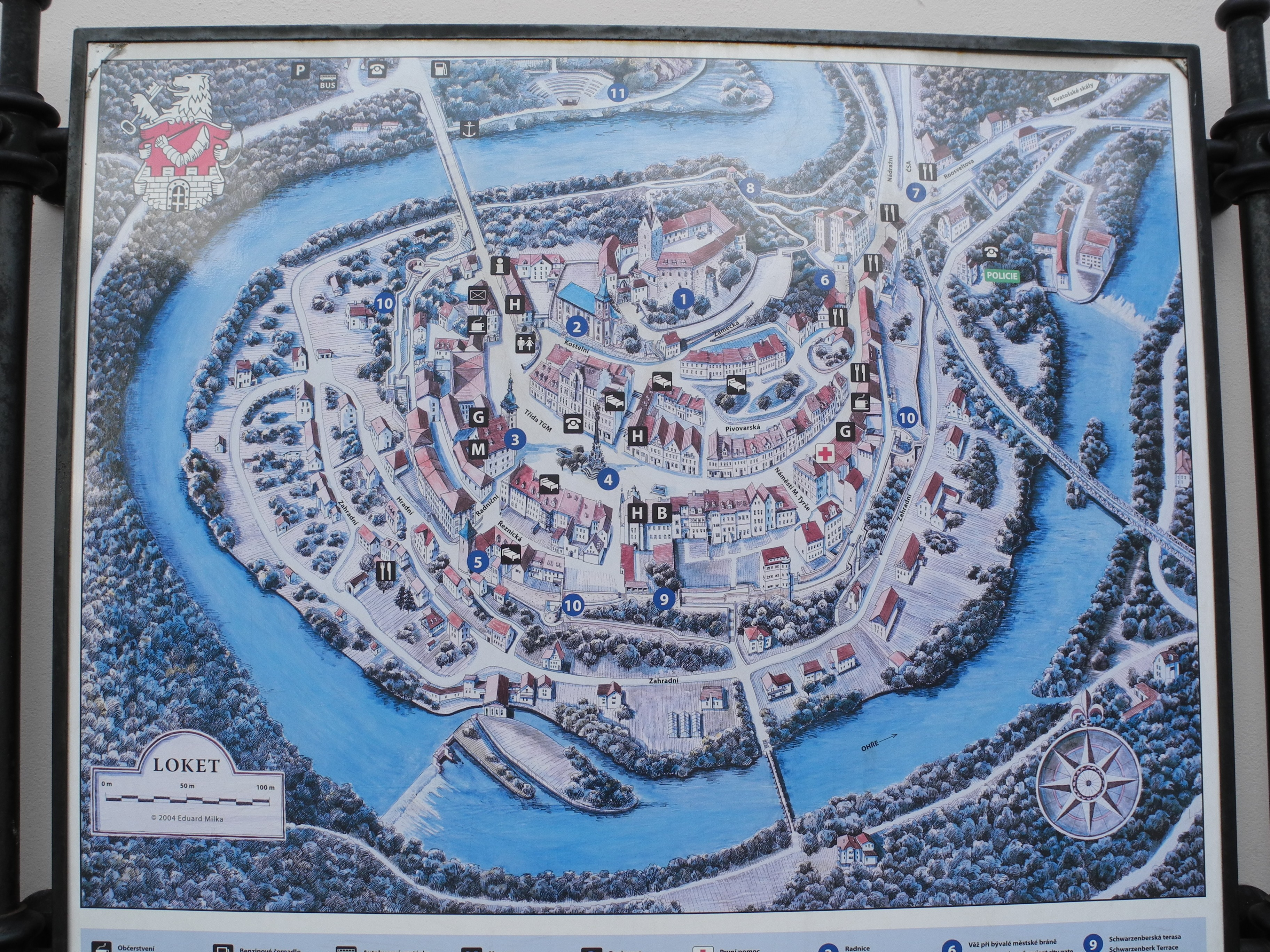 Loket - Infotafel